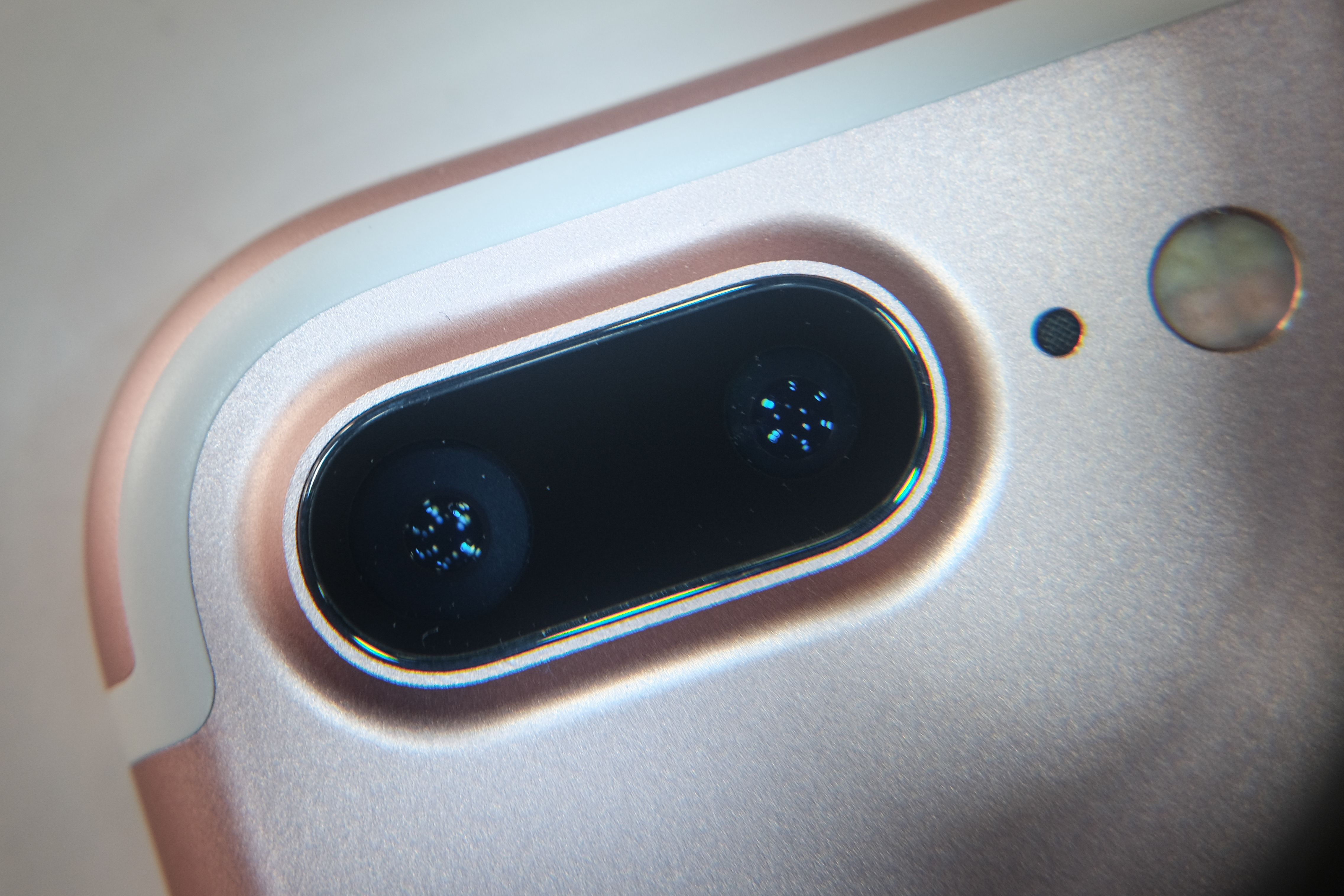 iPhone 7 Plus